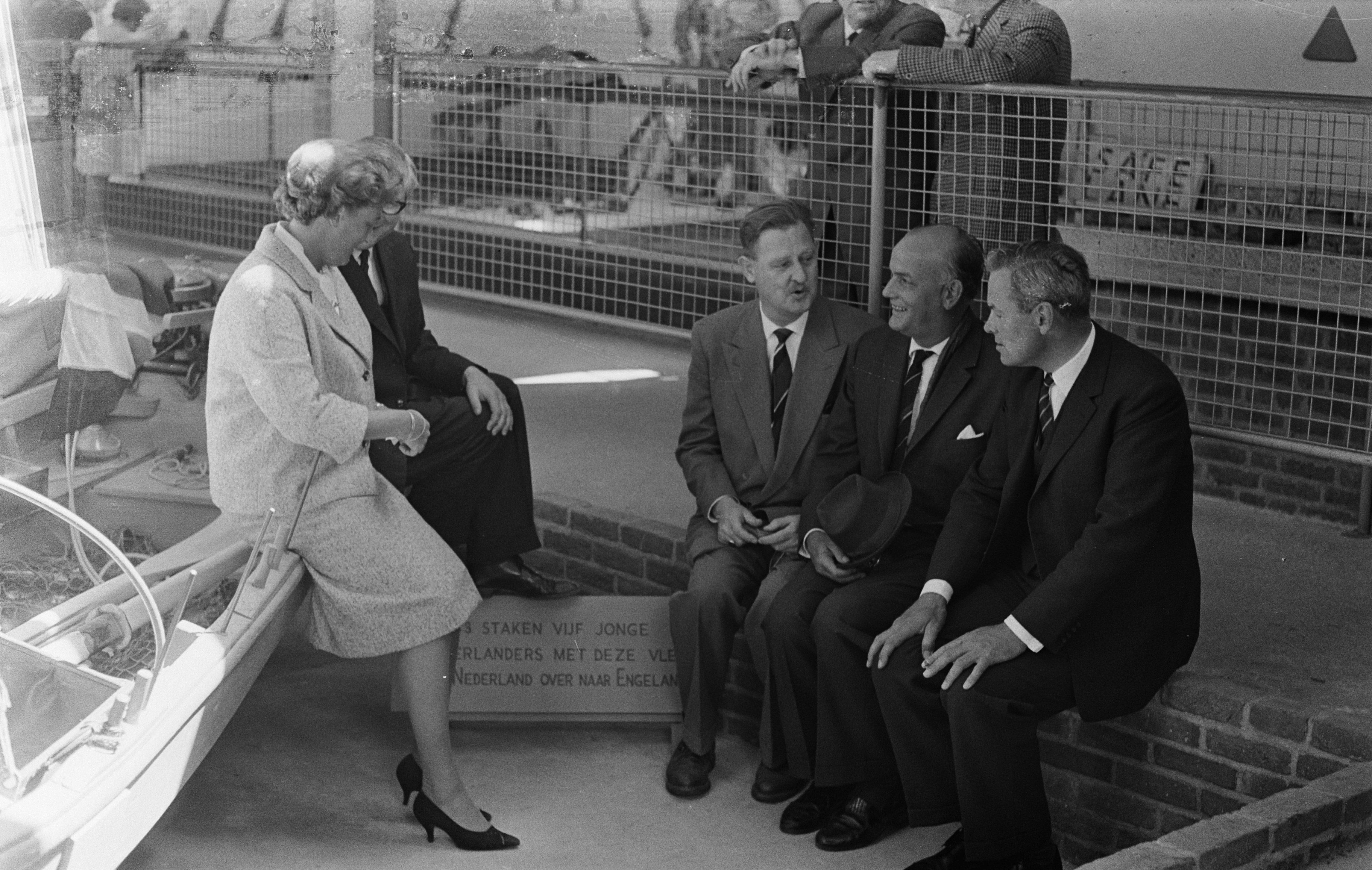 Collectie / Archief : Fotocollectie Anefo Reportage / Serie : Vijf Engelandvaarders bieden hun scheepje "De Yvette" aan, aan het Nationale Oorlogs- en Verzetsmuseum in Overloon (N-B), nr. 11, waaronder Yvette Batle, Jan Batlema, Henning Meijer, H. K. Sijpestein Beschrijving : Vijf Engelandvaarders bieden hun scheepje "De Yvette" aan, aan het Nationale Oorlogs- en Verzetsmuseum in Overloon (N-B), nr. 11 Yvette Bartlema-Sanders, Jan Bartlema, Henning Meyer, H. K. Sijpestein en Hein Louwerse Datum : 9 mei 1964 Locatie : Overloon Trefwoorden : aanbiedingen, musea, tweede wereldoorlog Fotograaf : Fotograaf Onbekend / Anefo Auteursrechthebbende : Nationaal Archief Materiaalsoort : Negatief (zwart/wit) Nummer archiefinventaris : bekijk toegang 2.24.01.05 Bestanddeelnummer : 916-4152 Reacties Geplaatst door Ernst Kaars Sijpesteijn op 03 januari 2014 - 21:56. Geachte heer/ mevrouw Op de foto staan de mannen en vrouw die overgestoken zijn naar Engeland april/ mei 1943: Op de rand van de vlet Yvette: Yvette Bartlema en Hein Kaars Sijpesteijn Daar tegenover v.l.n.r. Henning Meijer, Jan Bartlema en Hein Louwerse Met vriendelijke groet, Ernst P. Kaars Sijpesteijn (zoon van Hein)